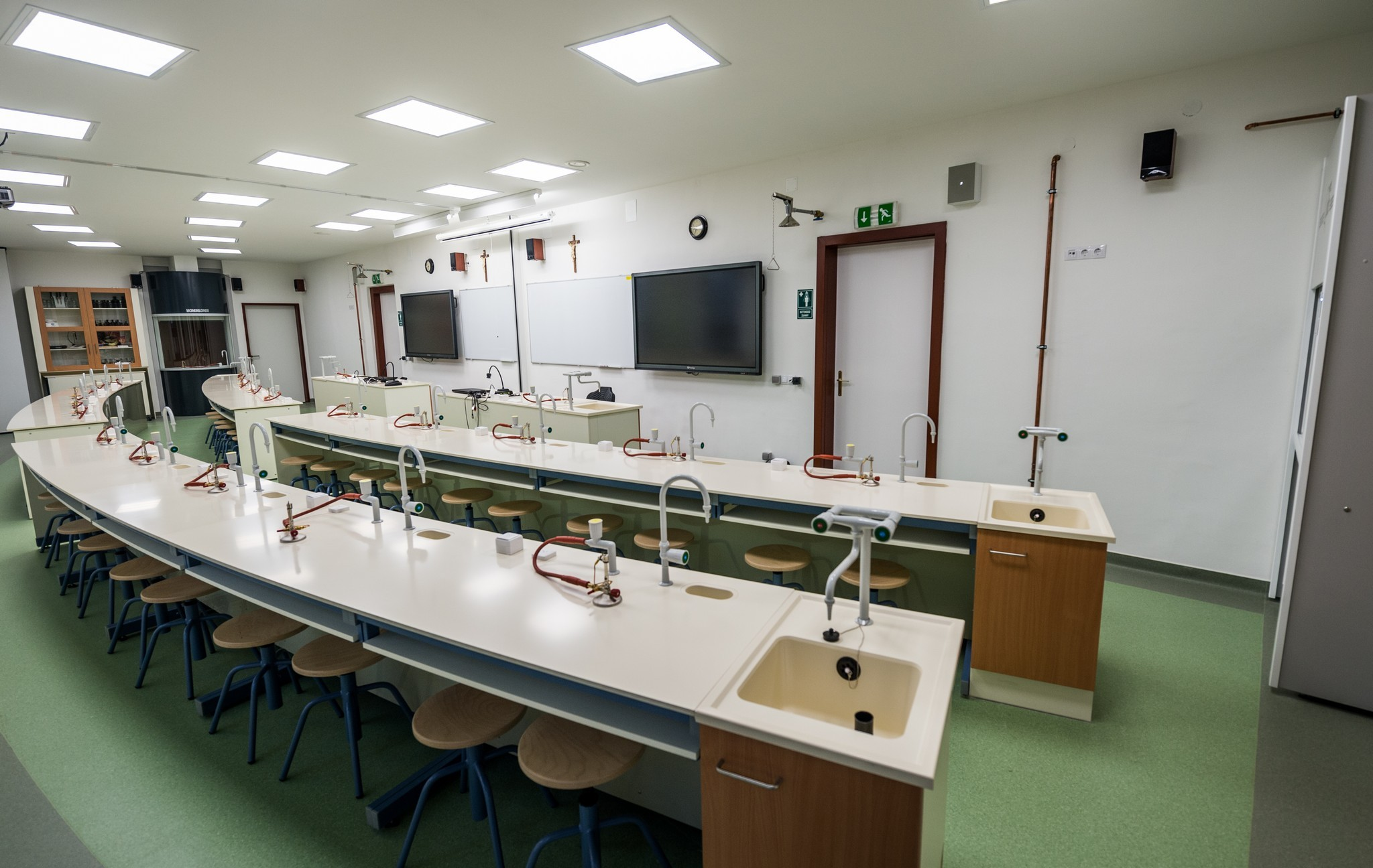 Az Inczédy Dénes labor 2014-ben a Ciszterci Rend Nagy Lajos Gimnázumában.